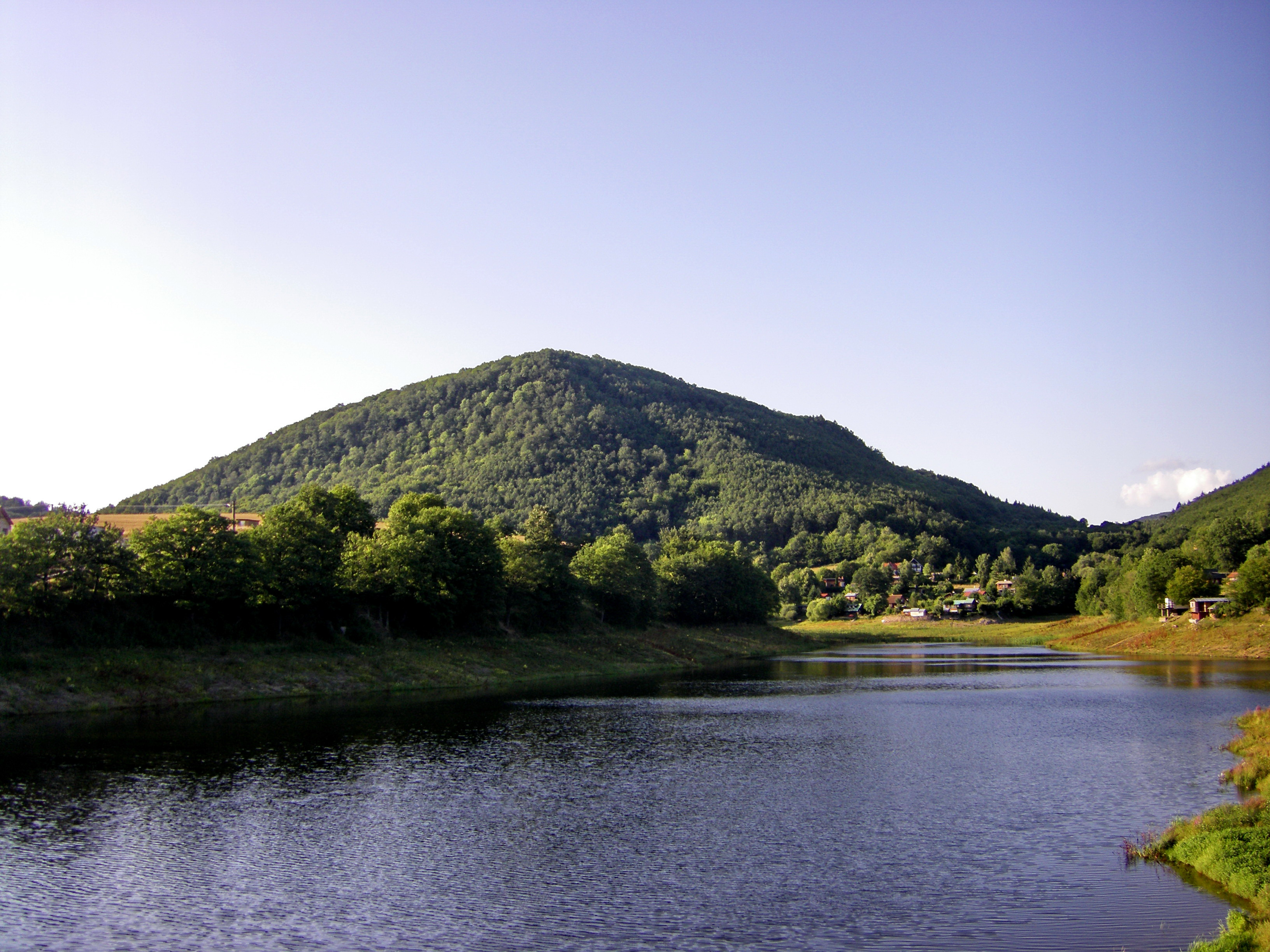 Nádrž vodná